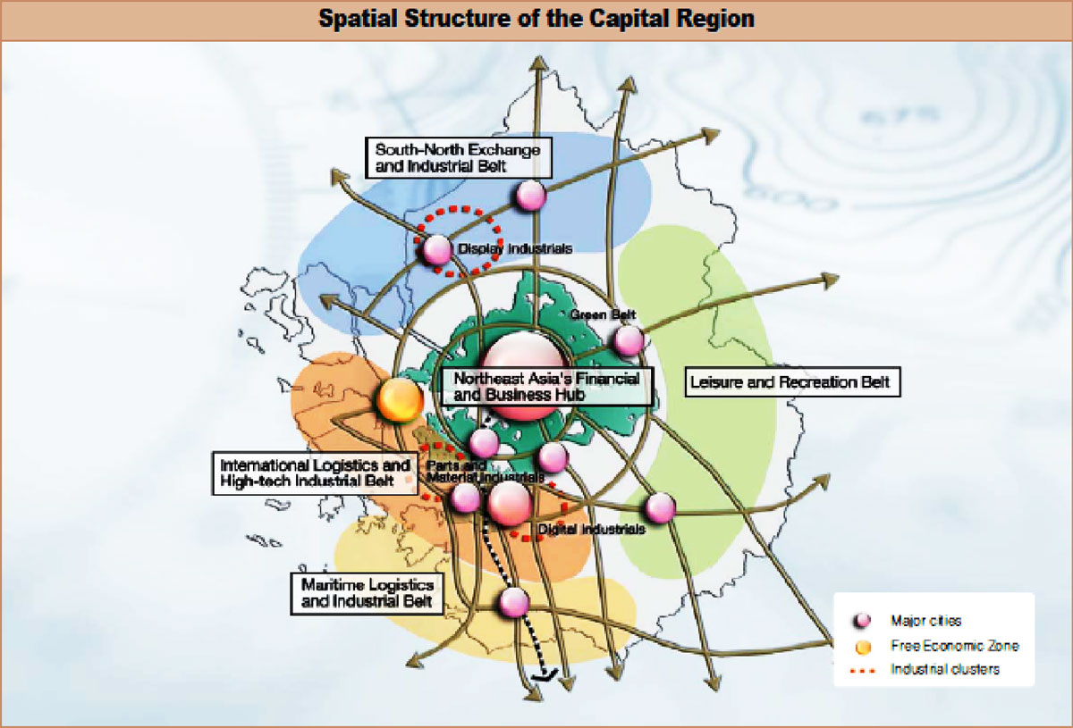 수도권 산업공간구조